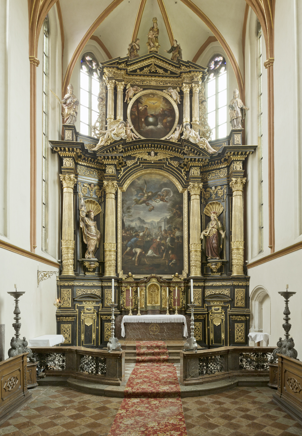 Hlavní oltář v kostele sv. Štěpána na Novém Městě pražském s obrazy od Matěje Zimprechta